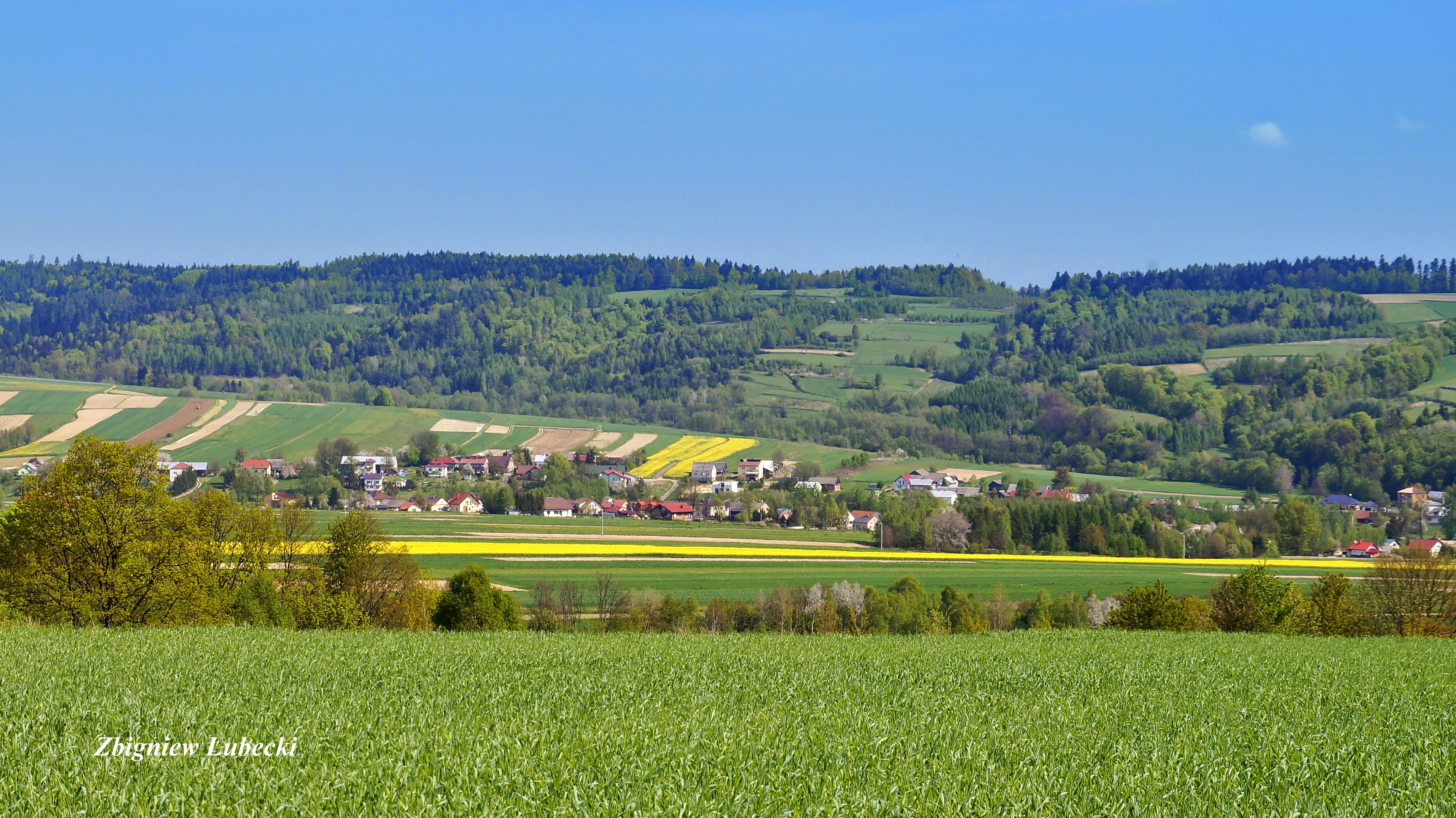 Harta - Ciepła Połać z Kamieńca